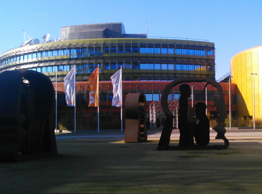 Das Sendebetriebsgebäude des ZDF, mit dem Platz der Köpfe im Vordergrund